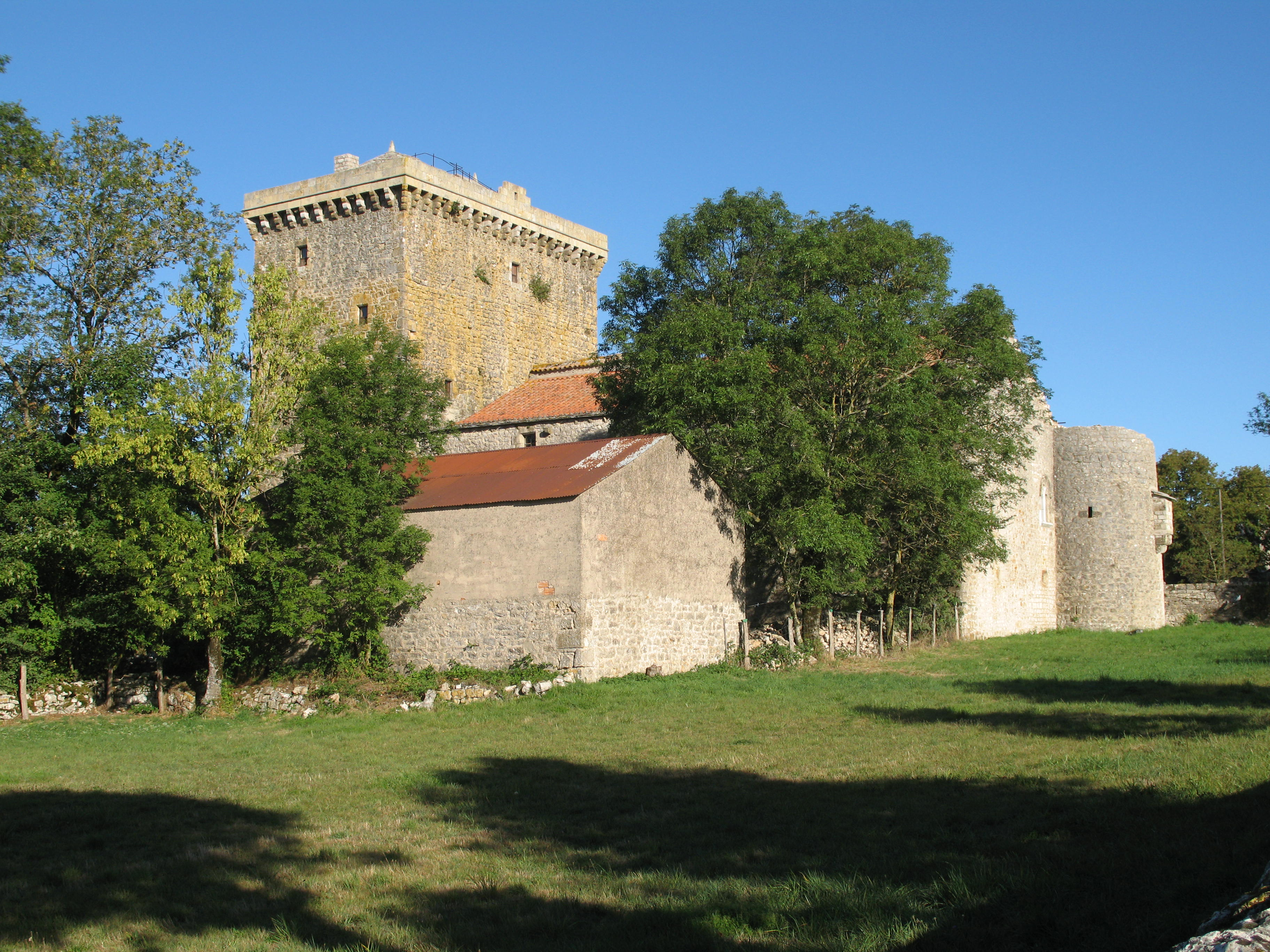 Tour du Viala-du-Pas-de-Jaux, dans l'Aveyron.